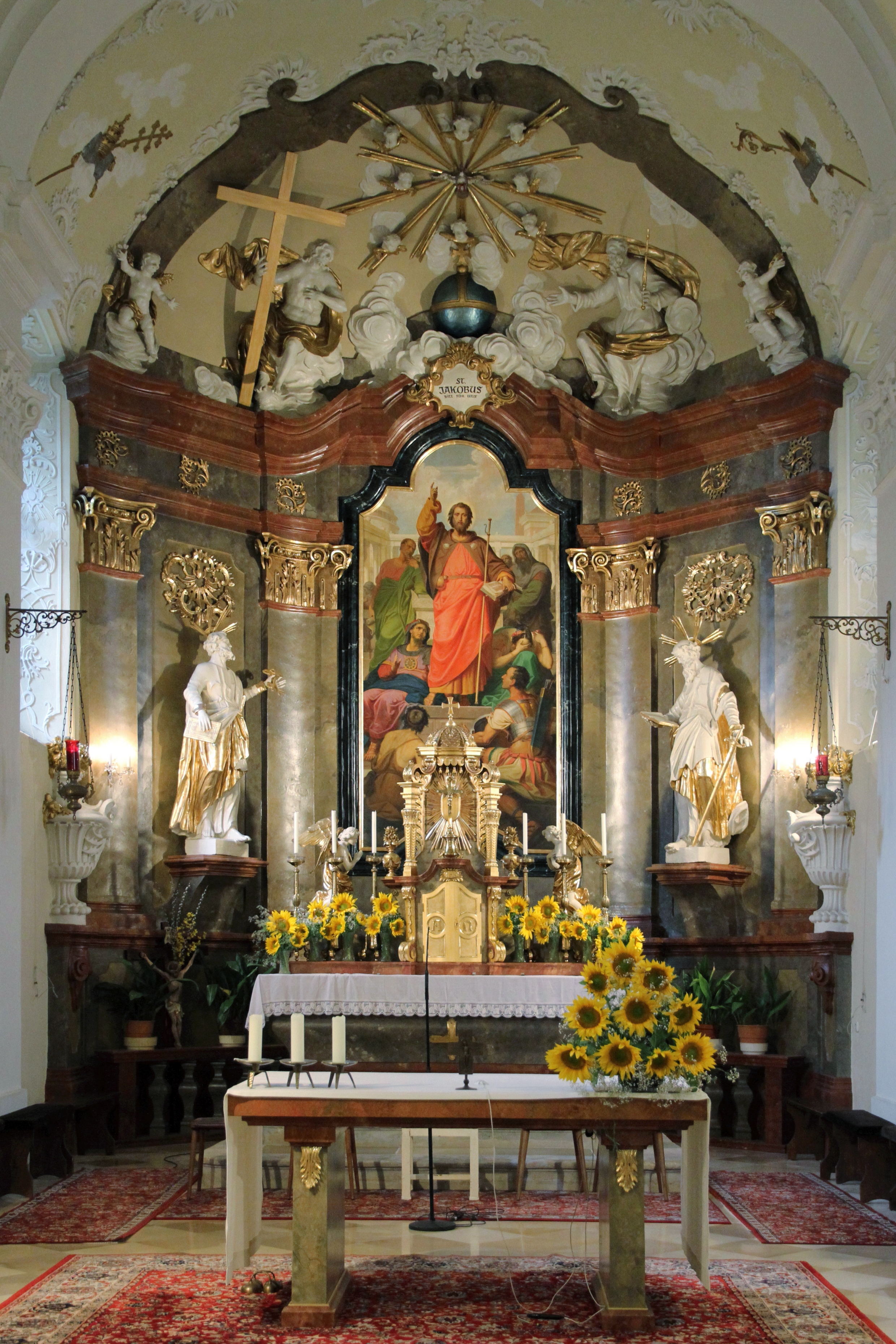 Der Hochaltar der katholischen Pfarrkirche hl. Jakob der Ältere in Etsdorf, ein Ortsteil der niederösterreichischen Marktgemeinde Grafenegg. Das Hochaltarbild ist ein Werk von Josef Kessler aus dem Jahr 1876.